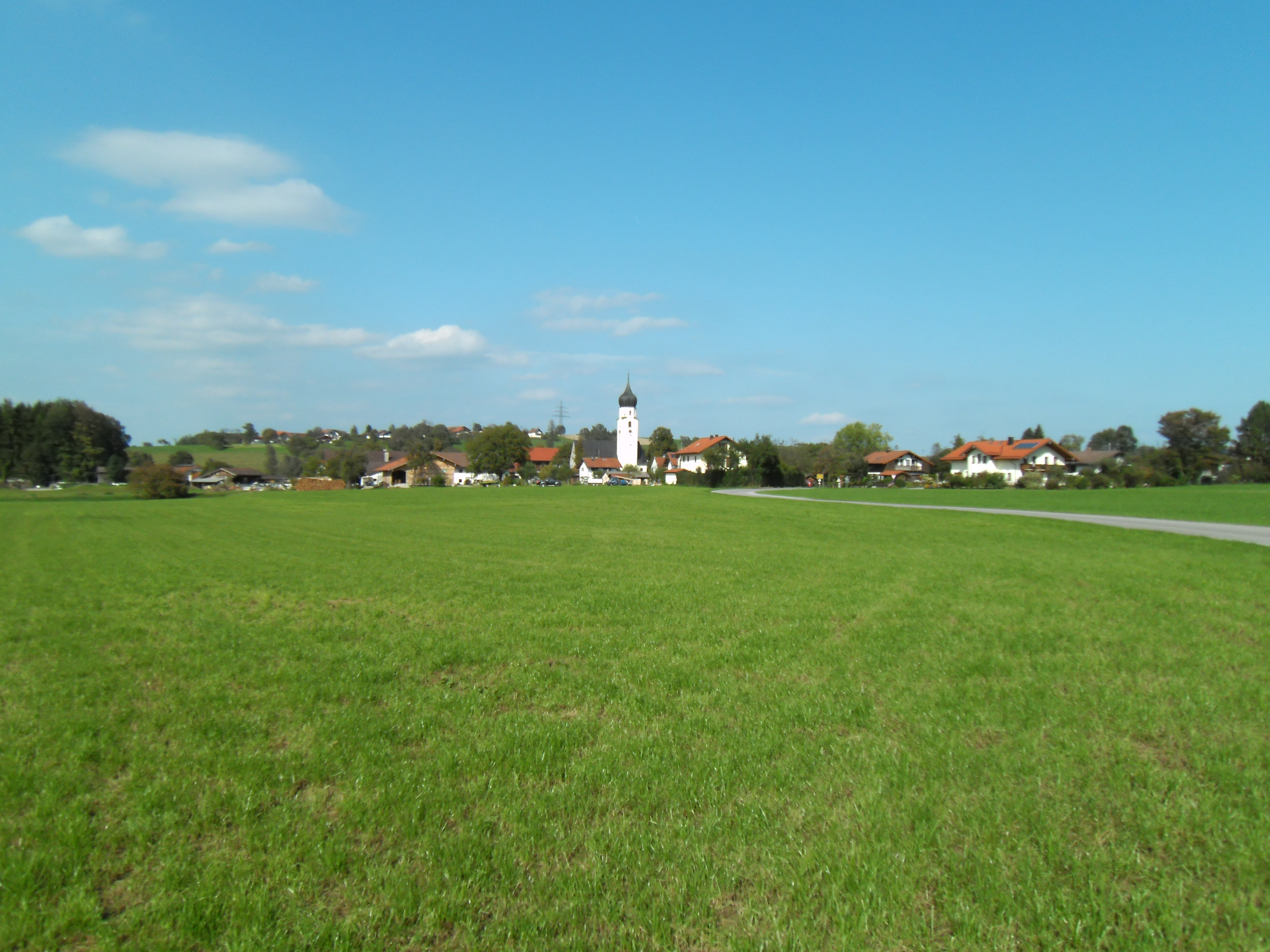 Gemeinde Rohrdorf (am Inn) im Landkreis Rosenheim, Oberbayern. Das Bild zeigt das eingemeindete Kirchdorf Lauterbach, aus südlicher Richtung gesehen.